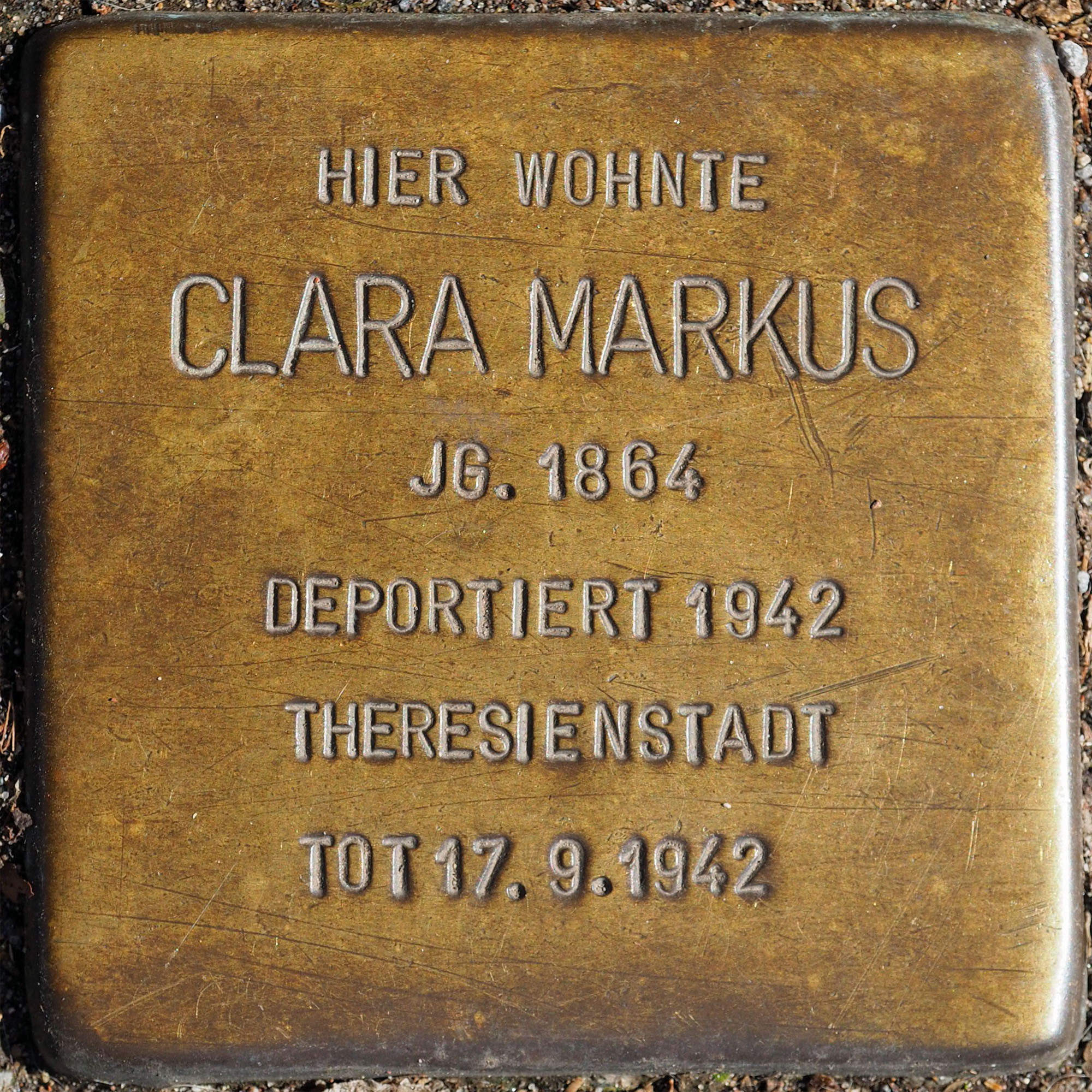 Stolpersteine MG: Markus, Clara